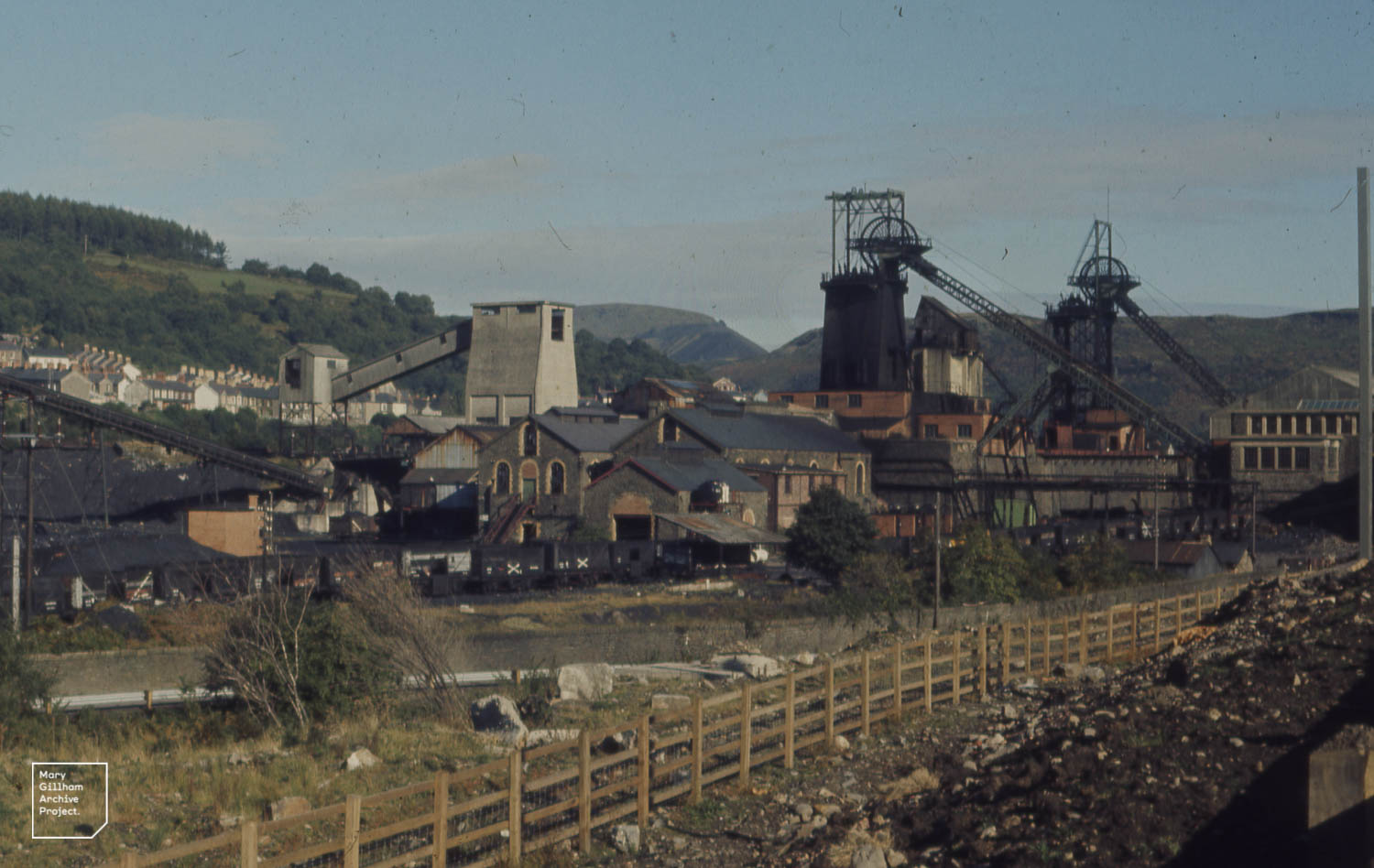 River Cynon at Abercynon Abercynon Coal Mine